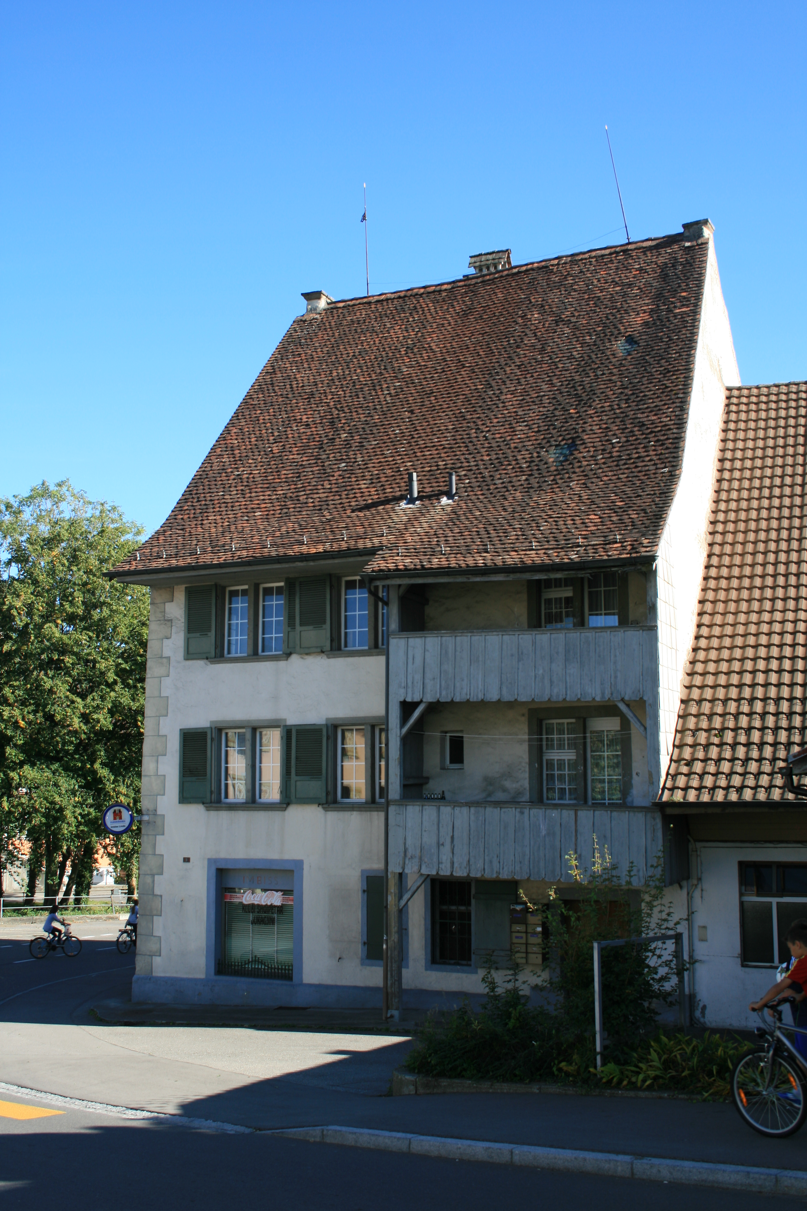 Ehemaliges Zehntenhaus; Niederlenz